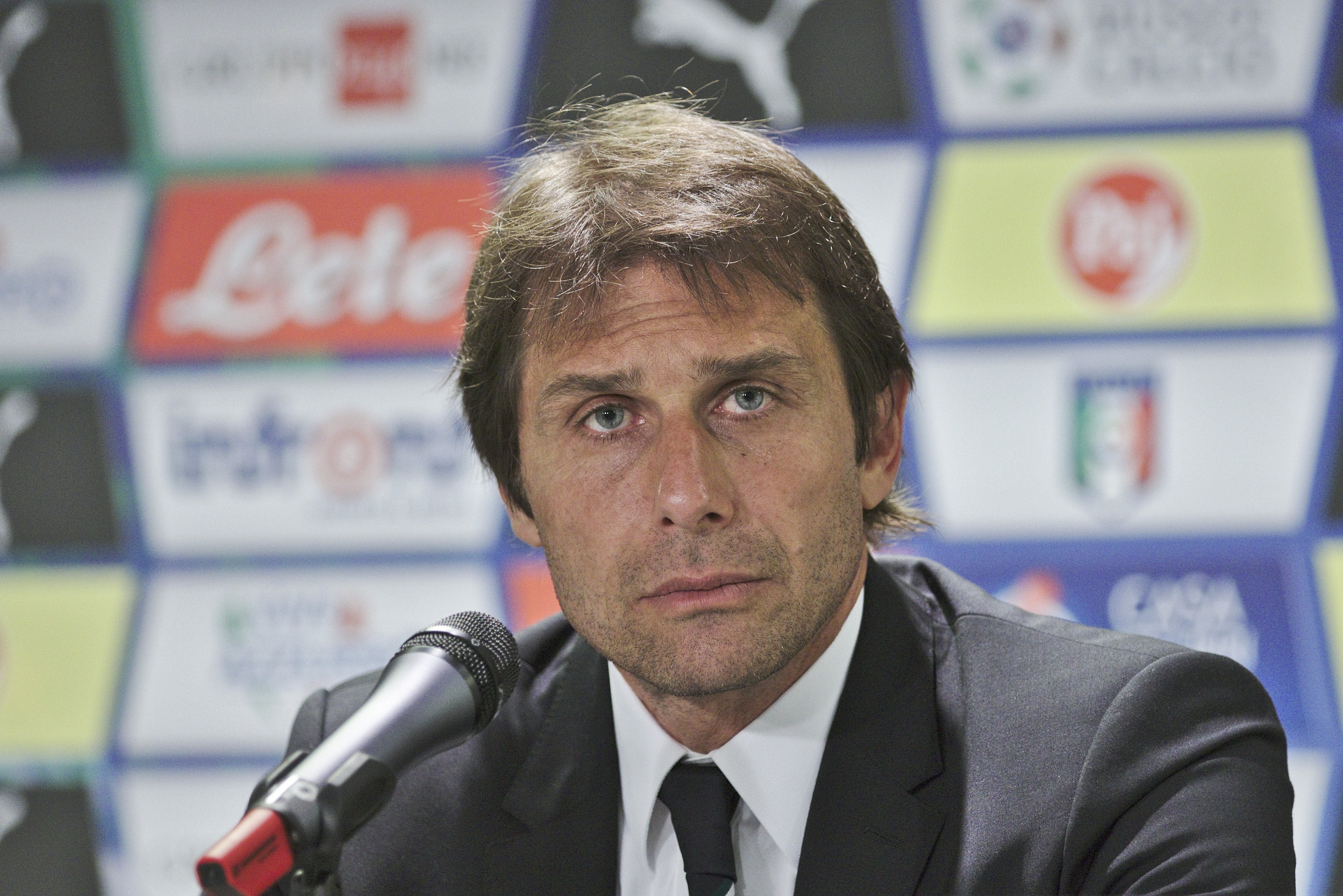 20150616 - Portugal - Italie - Genève - Antonio Conte